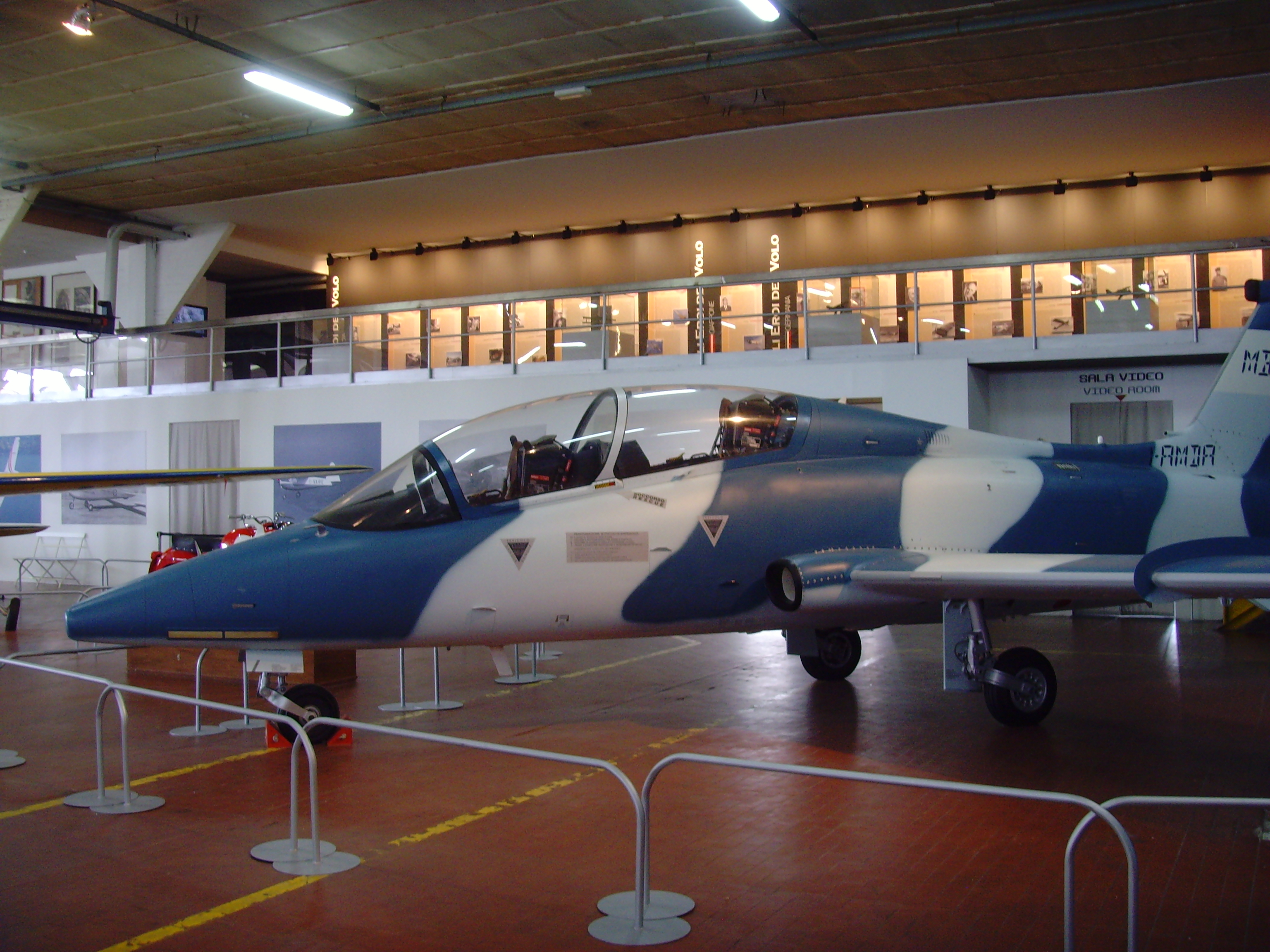 23 Volandia